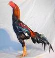 ayam bangkok